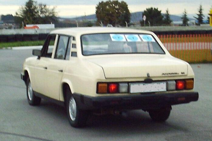 Türkiye'de seri olarak üretilen ilk otomobil markası Anadol'dan bir görünüm.